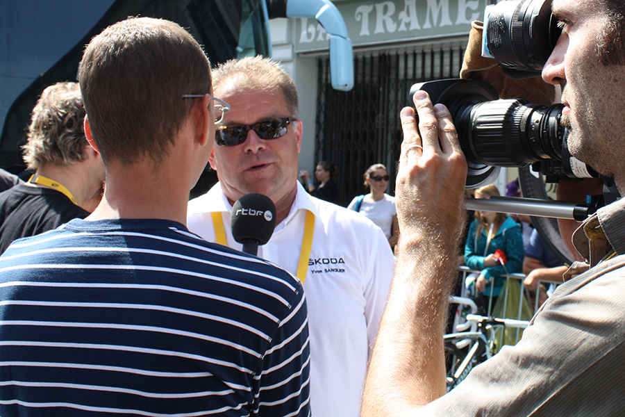 Yvon Sanquer, interviewé par la RTBF au départ de la 14ème étape du Tour de France, à Saint-Gaudens.